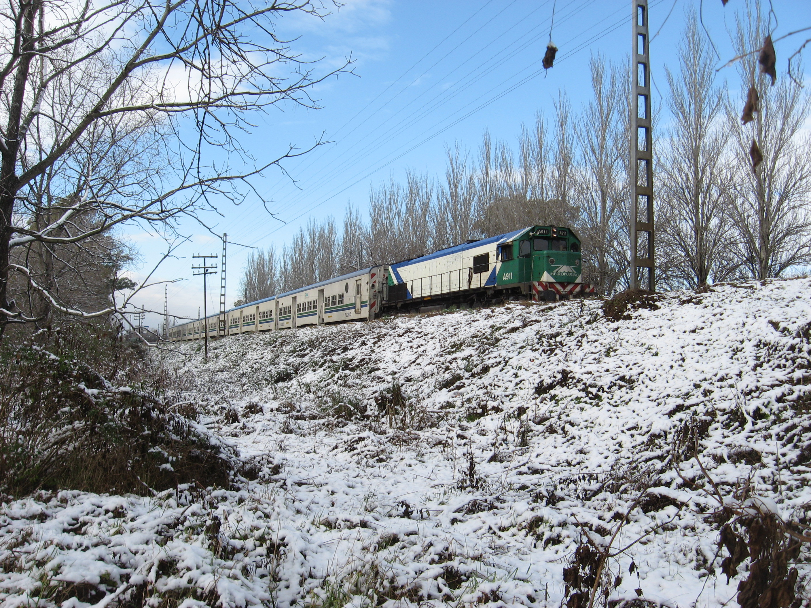 Formación de la empresa Metropolitano cubriando el ramal Buenos Aires - La Plata durante la histórica nevada del 2007. Foto entre Gonnet y City Bell.